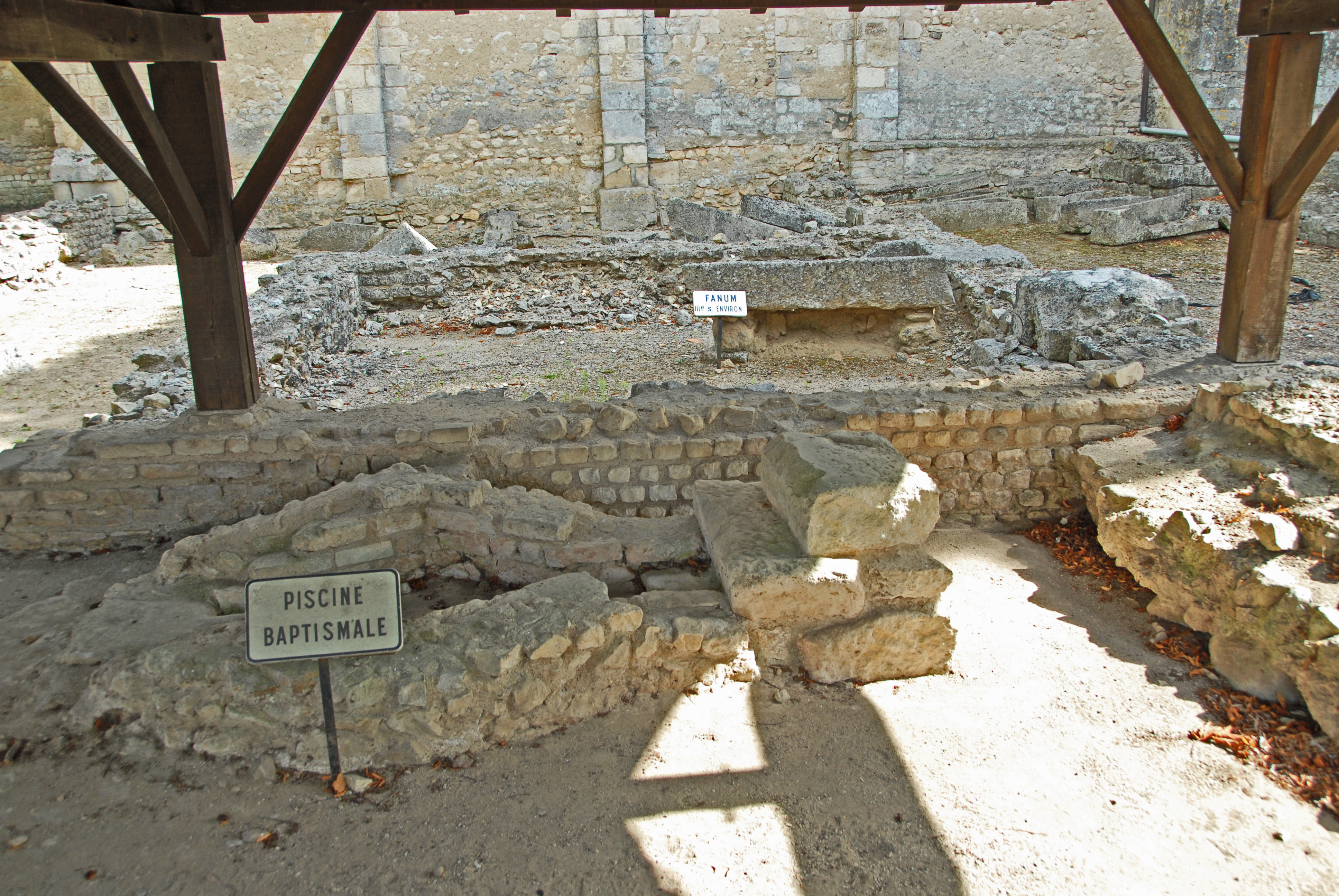 Civaux, Sanktuarium, Baptisterium